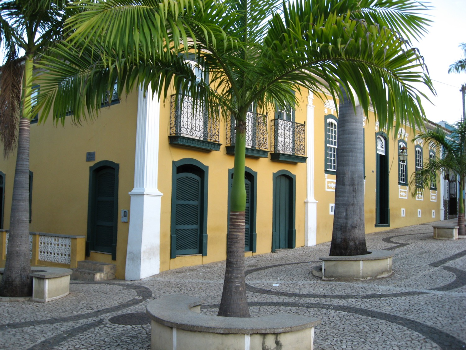 Casa natal do educador Anísio Teixeira, Caetité (Solar da Família Fraga, no século XIX)